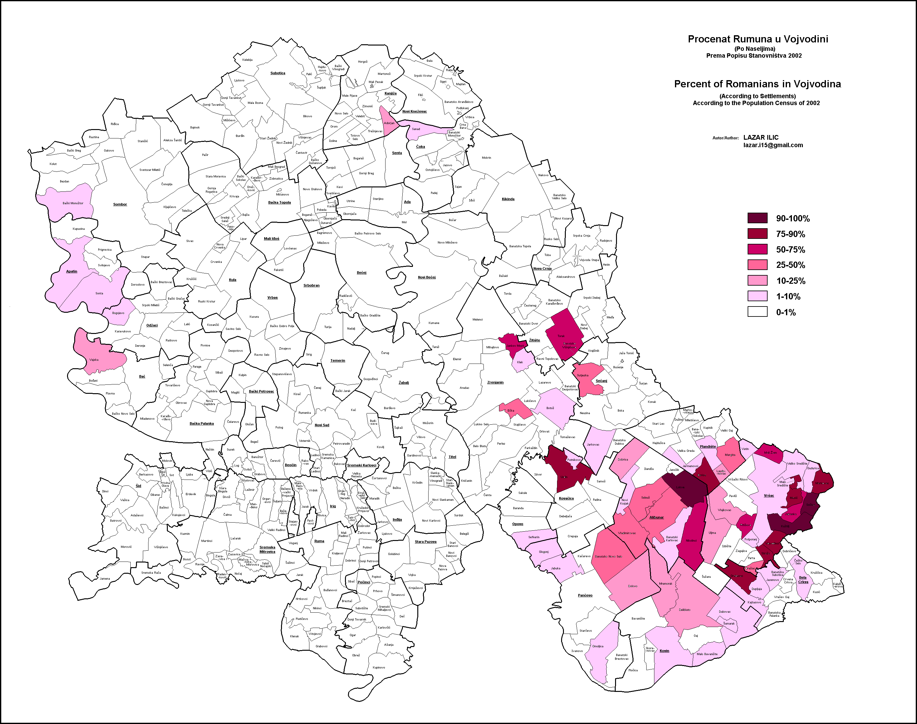 Удео Румуна у Војводини по насељима 2002. године. Аутор: Лазар Илић